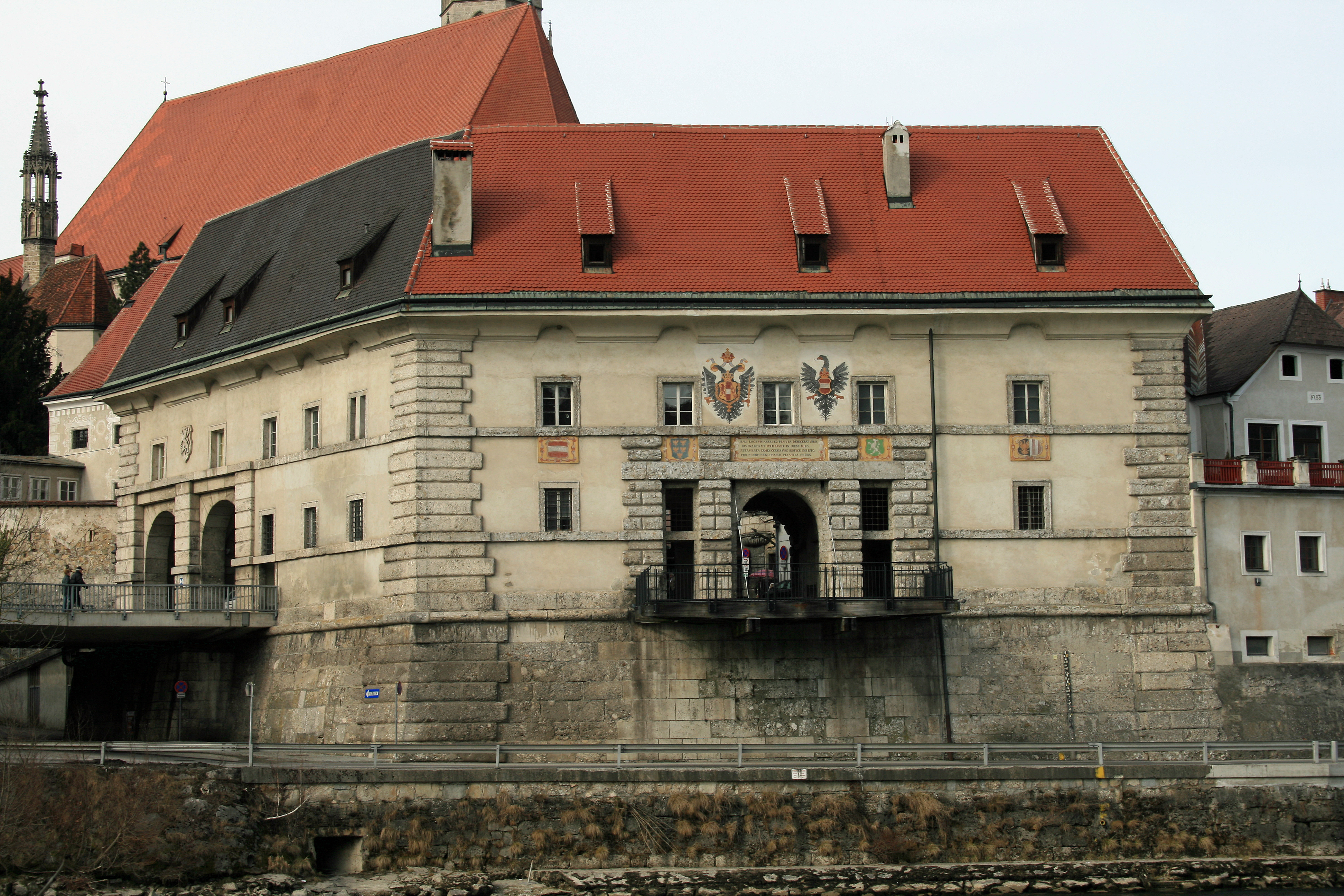 Das Steyrer Neutor von der Schönauerbrücke aus gesehen